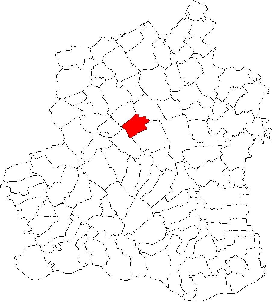 Categorie:Hărţi ale judeţului Teleorman